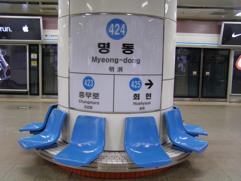 명동역 역명판